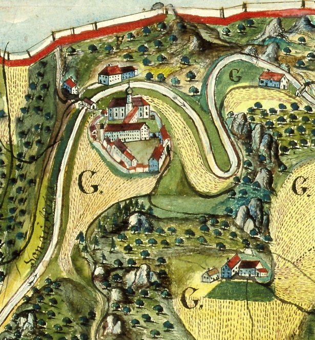 Beuron um 1787 Ausschnitt aus einer Karte als Anlage zu einem Gutachten "Beweise der Stift Beuronischen Reichsunmittelbarkeit" vom 15. September 1787